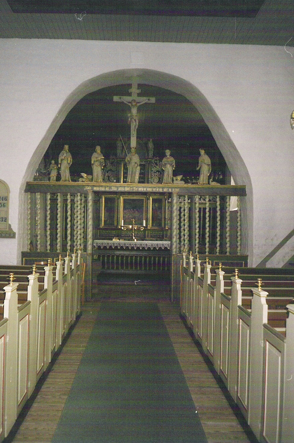 Feldballe kirke - korbuen.